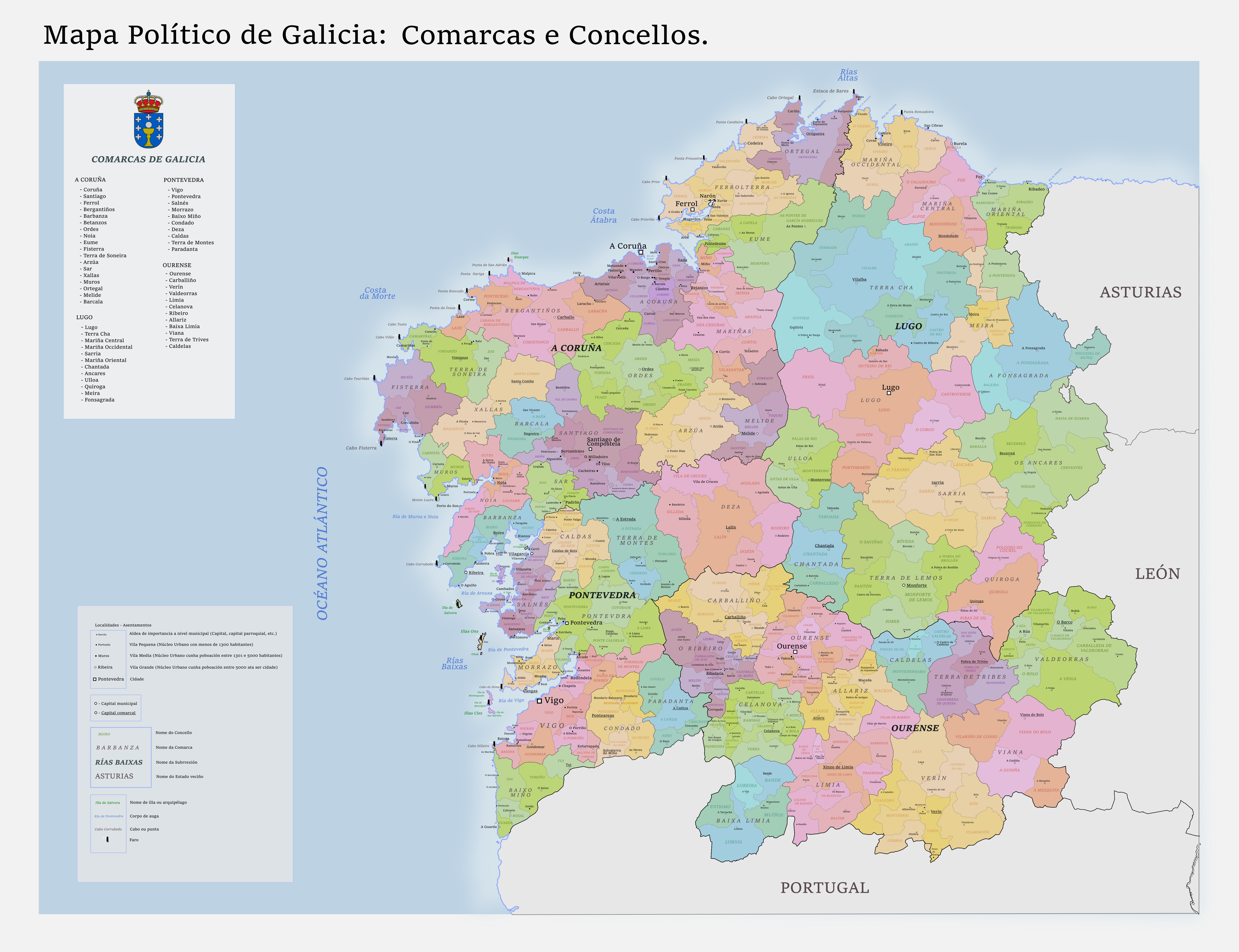 Mapa de Galicia con sus provincias, comarcas, municpios, capitales municipales y otras localidades importantes.